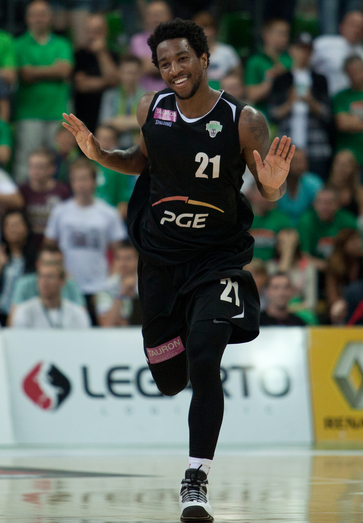 J.P Prince i Tony Taylor PGE Turów Zgorzelec